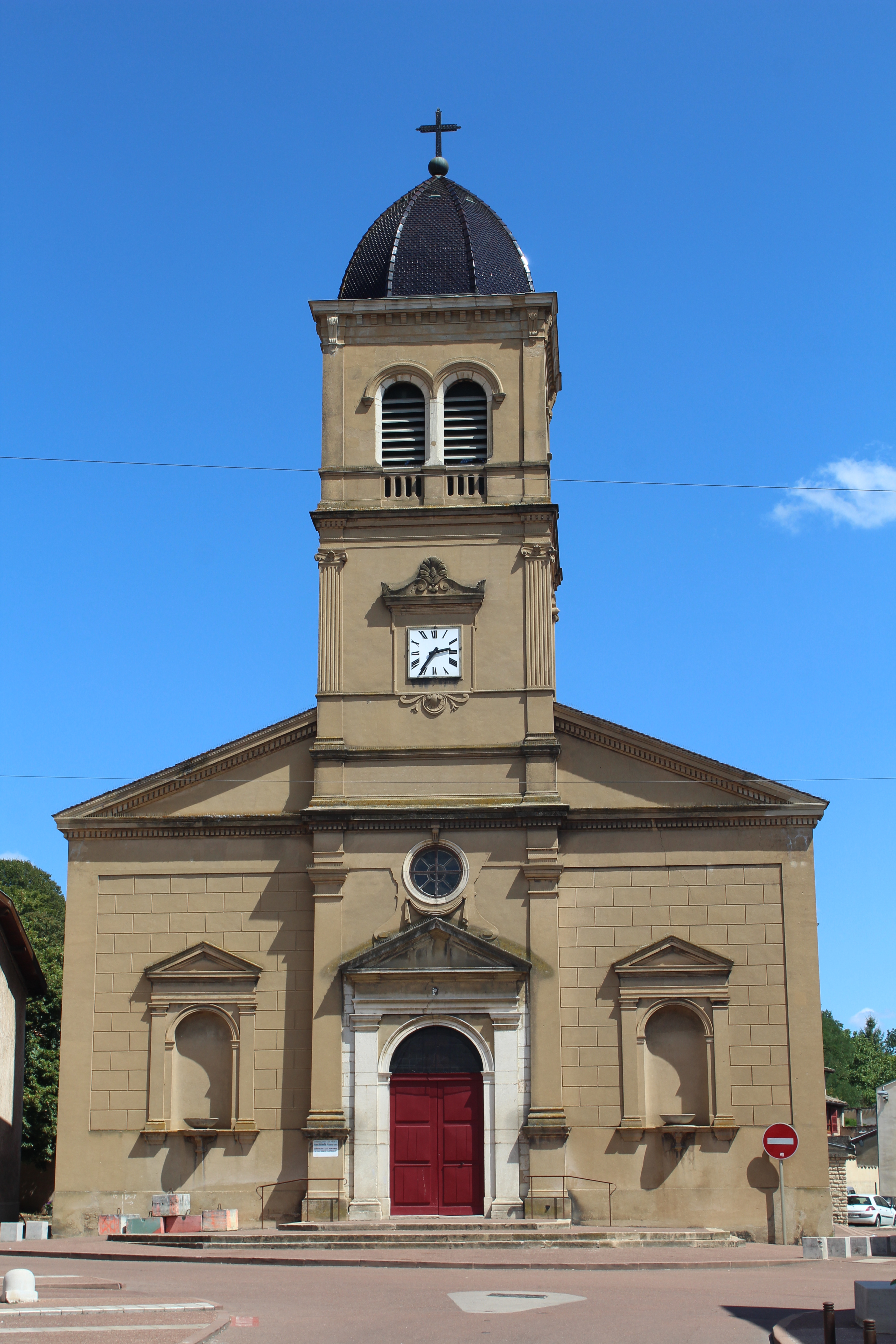 Église Saint-Nicolas de Montmerle-sur-Saône.